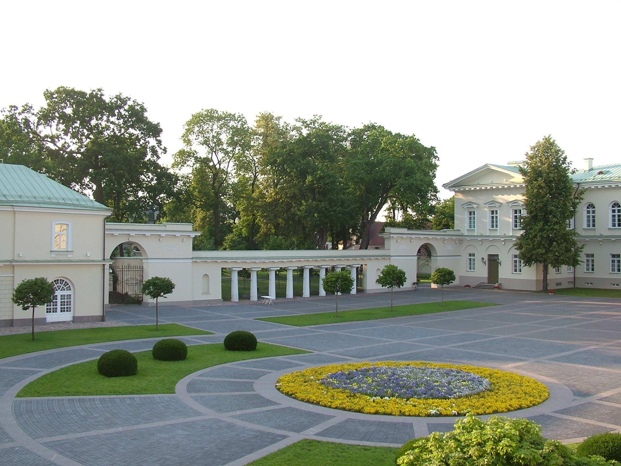 Presidential Palace in Vilnius, Lithuania.